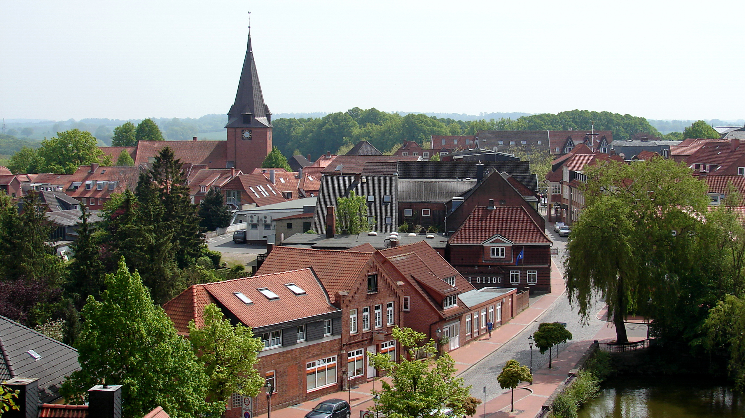 Blick vom Bismarckturm auf Lütjenburg Panorama